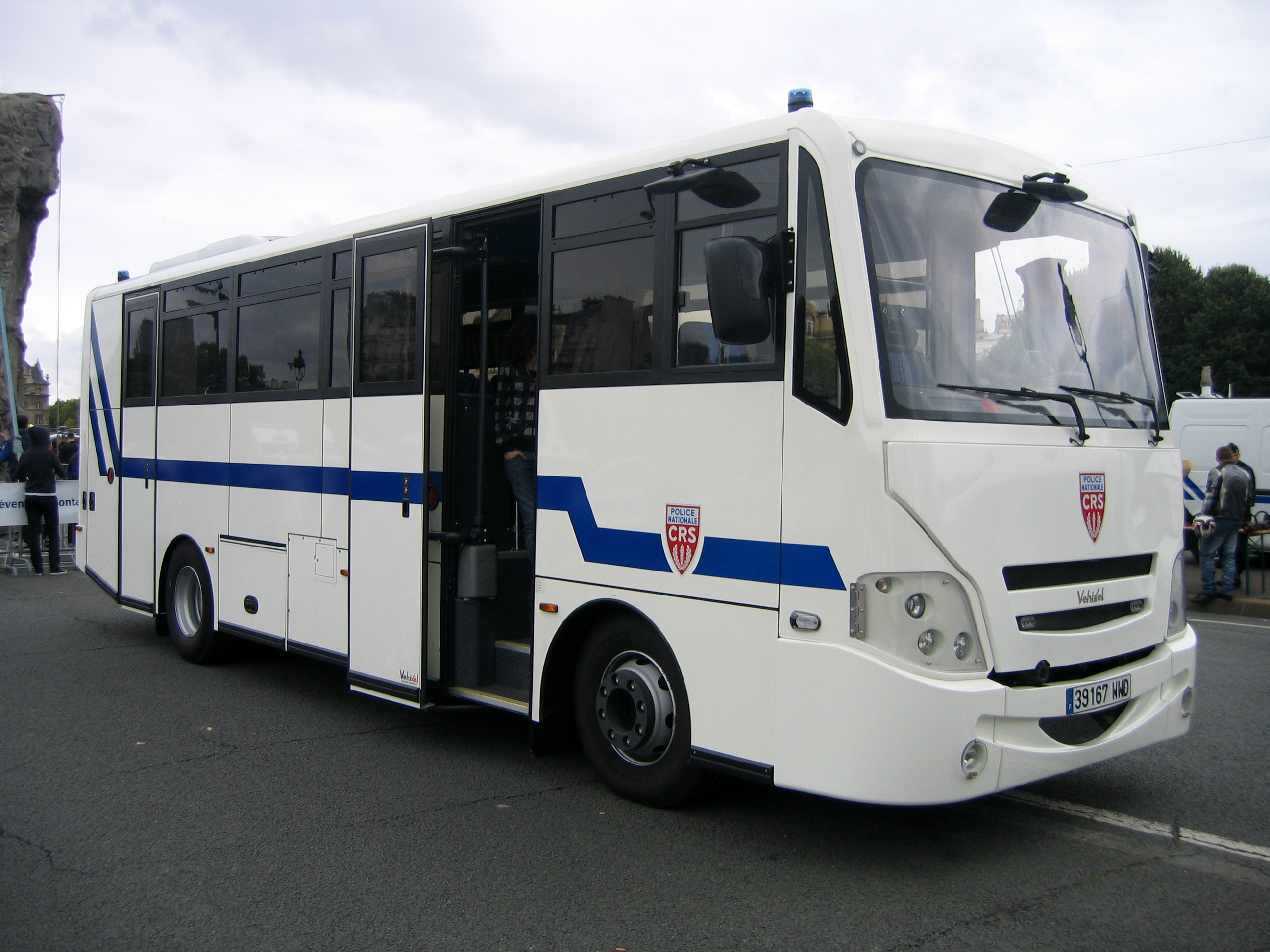 Véhicule CRS lors des journées de sécurité intérieures 2009 sur l'esplanade des Invalides.